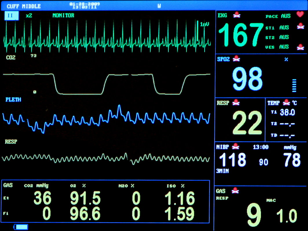 Per Narkosemonitoring erhobene Basiswerte: Kapnometrie und Pulsoximetrie Autor: Kalumet, selbst erstellt, 11.11.2005